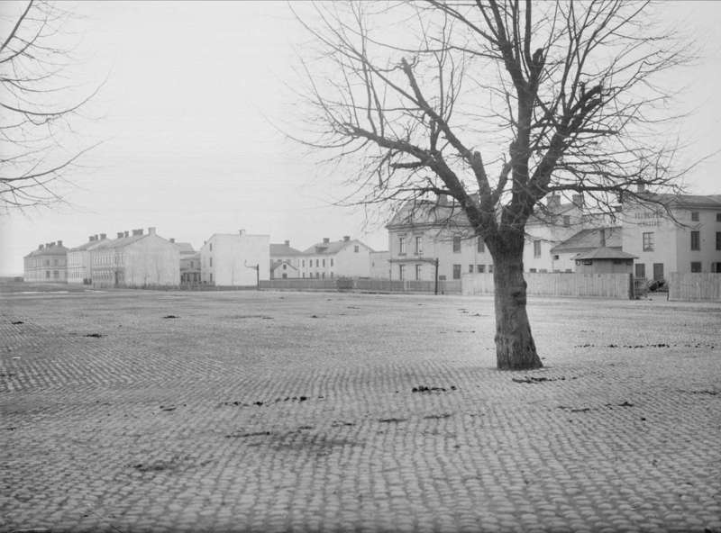 Vaksala torg i Uppsala från norr 1901-1902. Foto: Alfred Dahlgren.